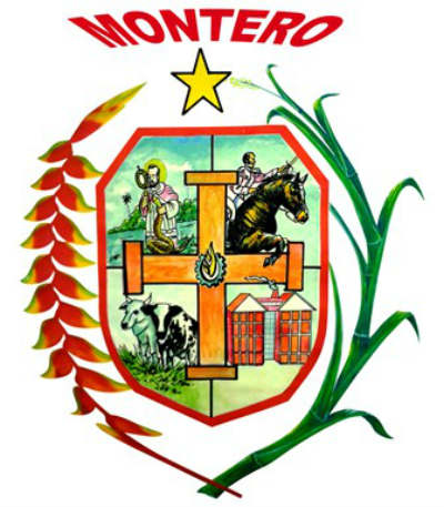 Escudo de Montero